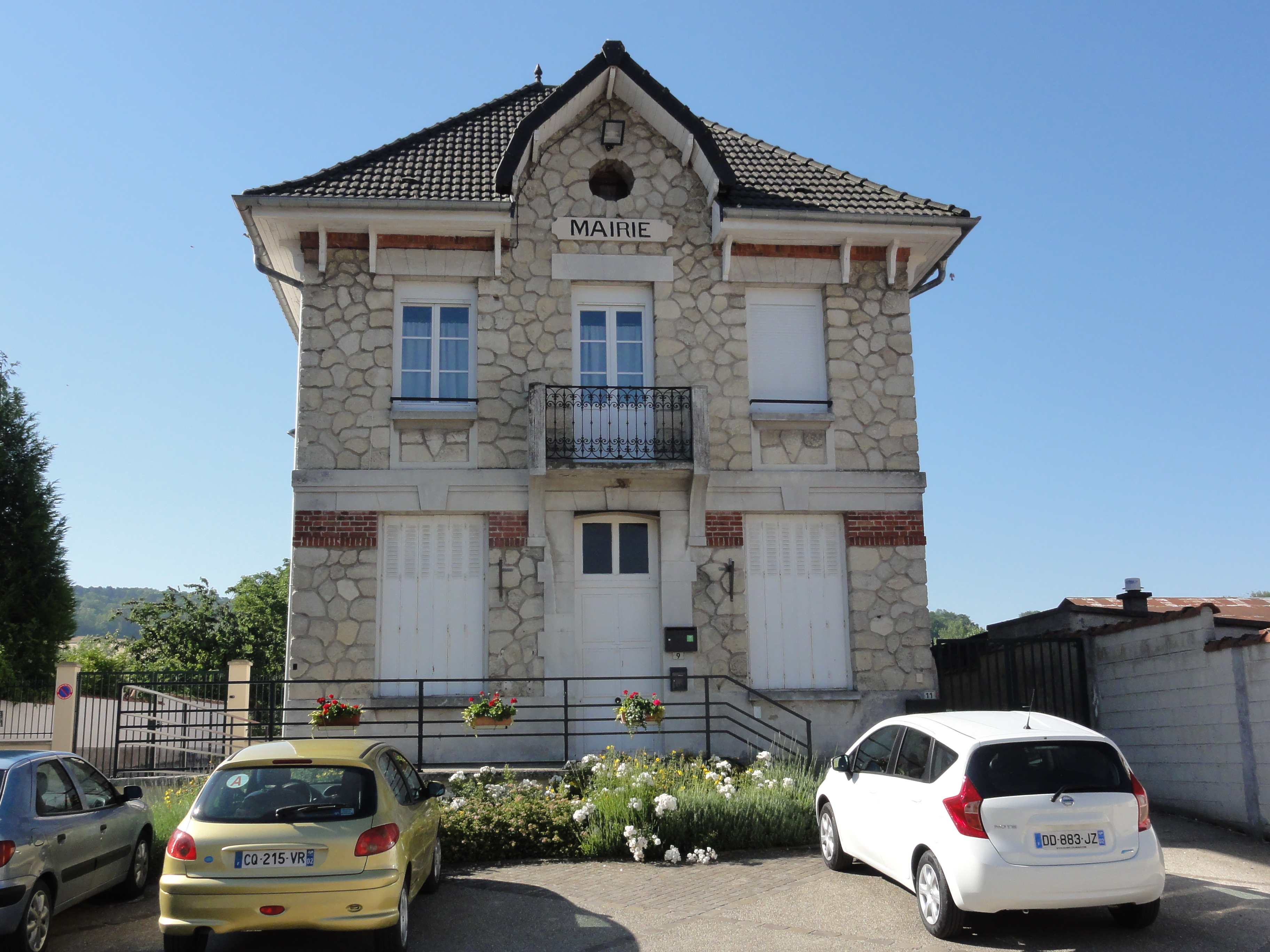 Concevreux (Aisne) mairie